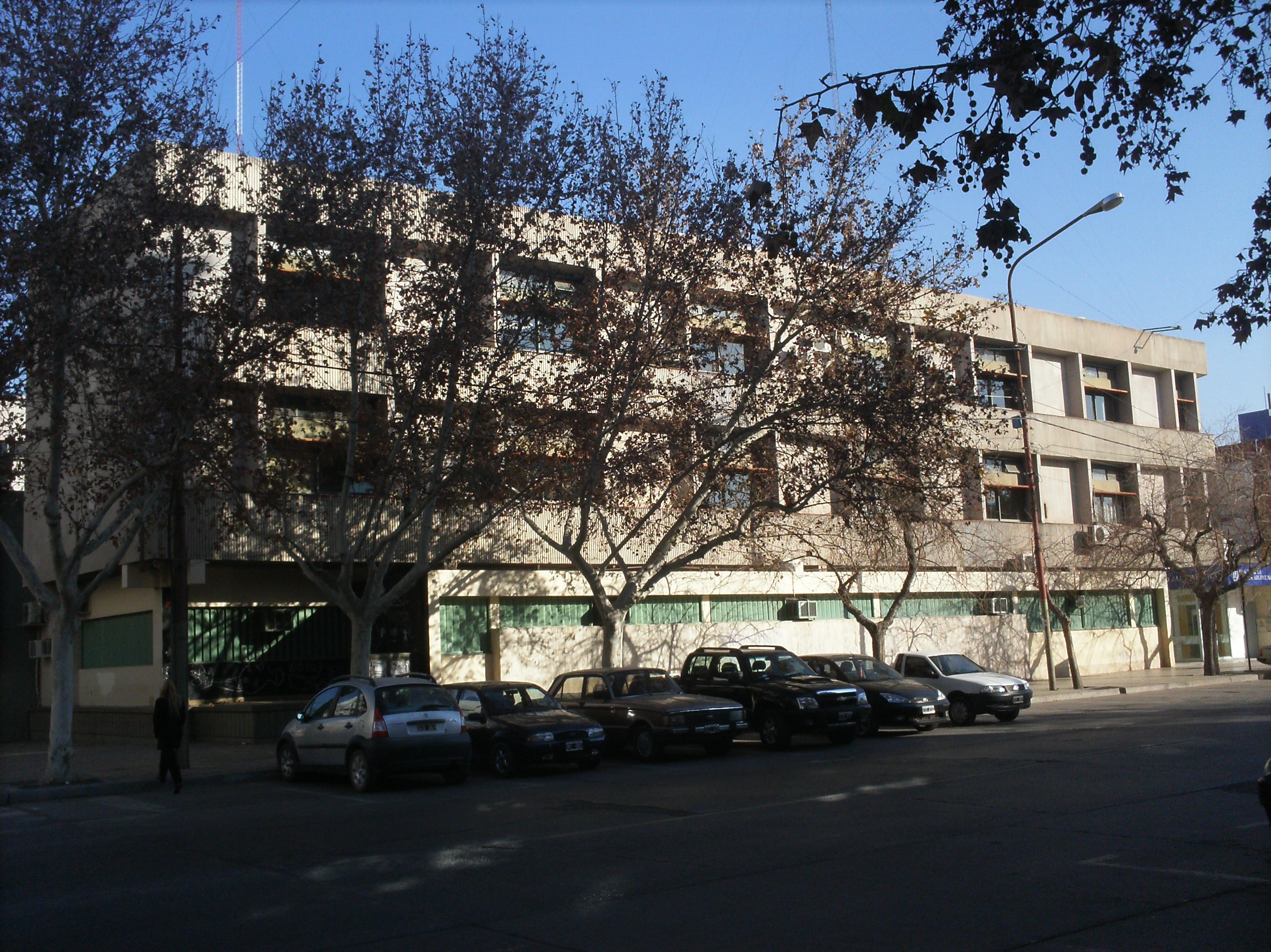 Facultad de Filosofía, Humanidades y Artes en las inmediaciones del centro de la Ciudad de San Juan